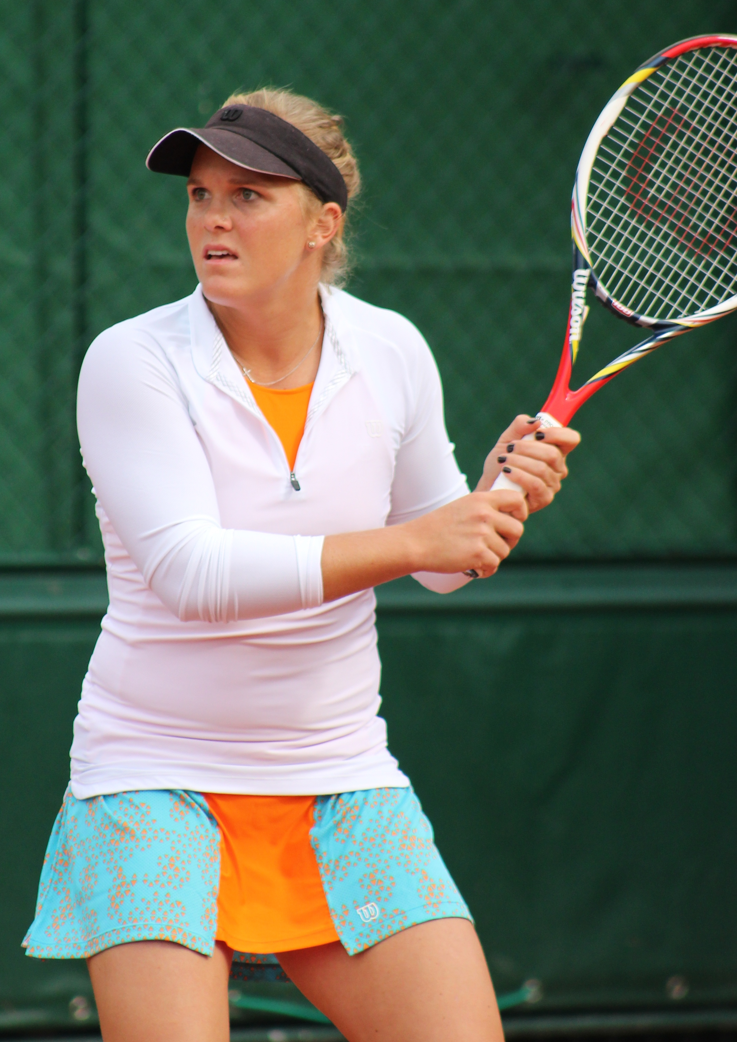 Oudin RG13 (10)